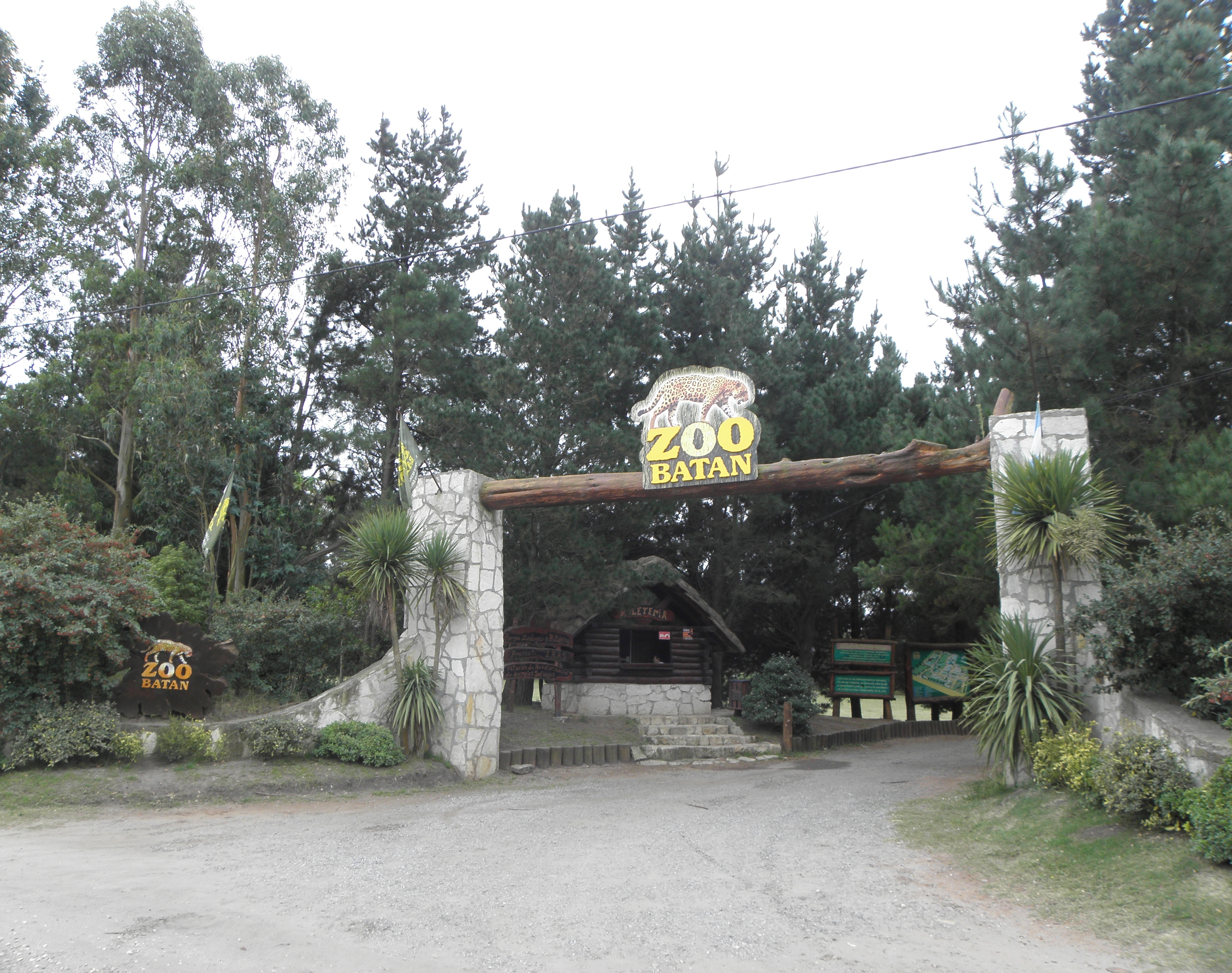 Zoológico de Batán, provincia de Buenos Aires, Argentina.